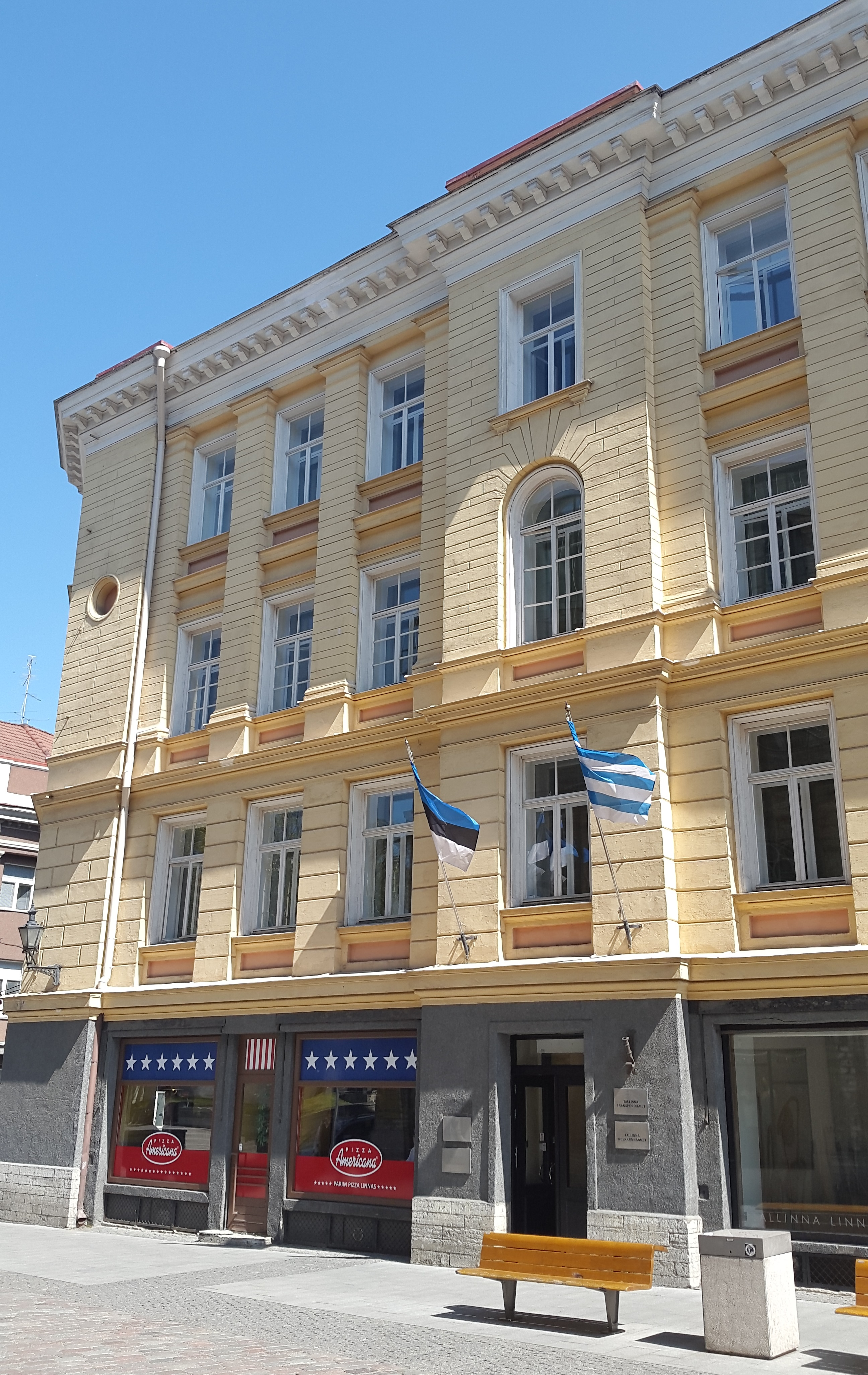 Tallinna Keskkonnaameti hoone aadressil Harju tn 13.